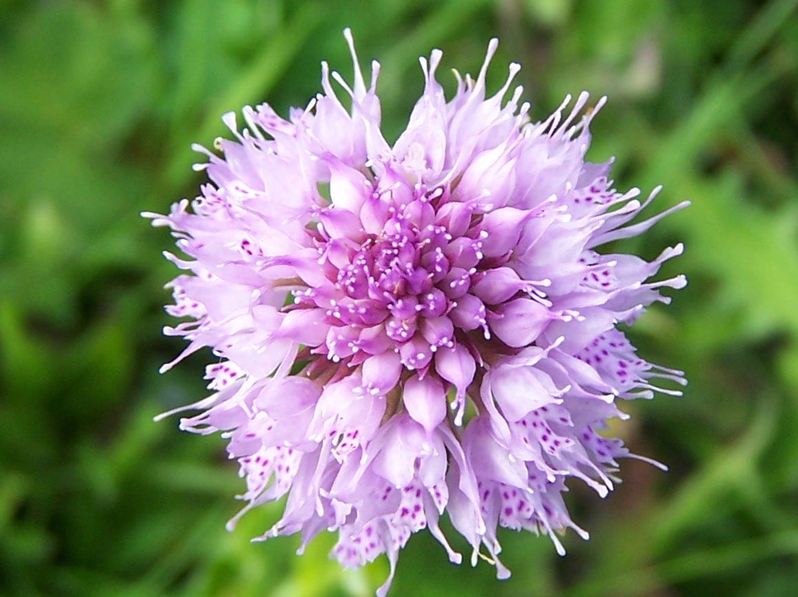 Traunsteineria globosa (pl. storczyca kulista), habitat: West Tatra Mountains, Miętusi Przysłop